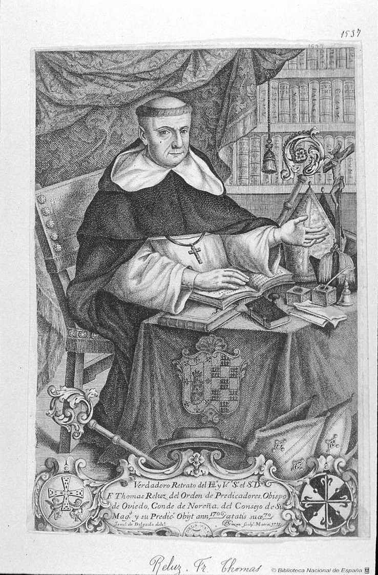 Retrato de fray Tomás Reluz, "Verdadero Retrato del Ill.º y V. Sr. Dn. F. Thomas Reluz del Orden de Predicadores, Obispo de Oviedo. Conde de Noreña, del Consejo de Su Magd. y su Predicr. Obijt ann. 1706. aetatis suae 70", Madrid, Biblioteca Nacional de España.